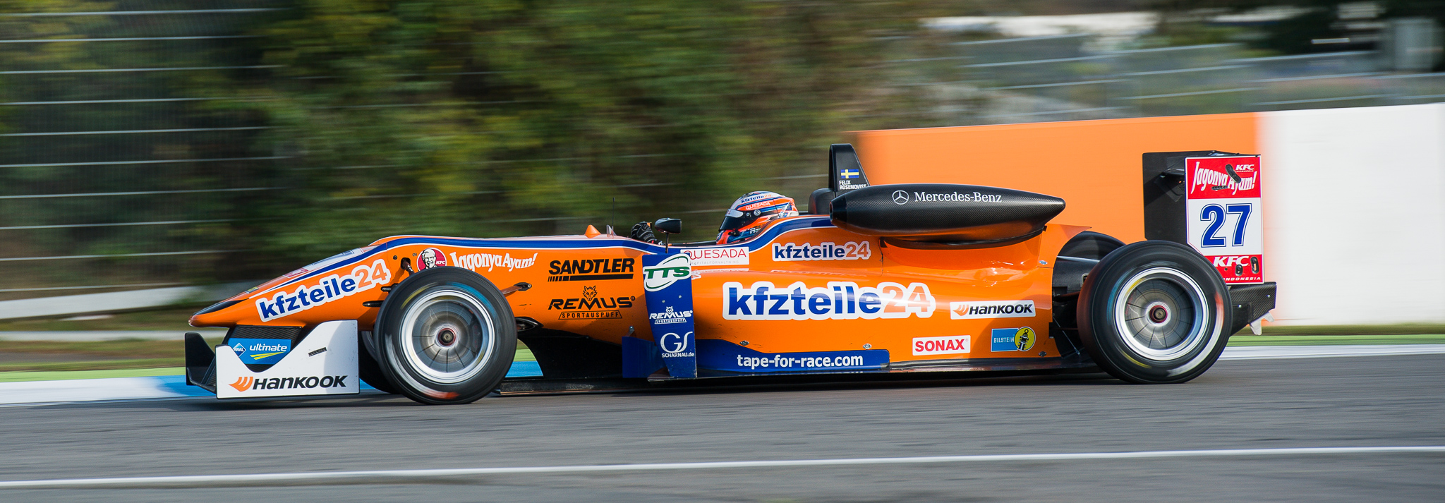 DTM,Dallara F312,Deutsche Tourenwagen Masters,F3 FIA European Championship,FIA Formel 3 Europameisterschaft,Felix Rosenqvist,Hockenheimring,Mercedes-Benz,Motorsport,Mücke Motorsport,kfzteile24